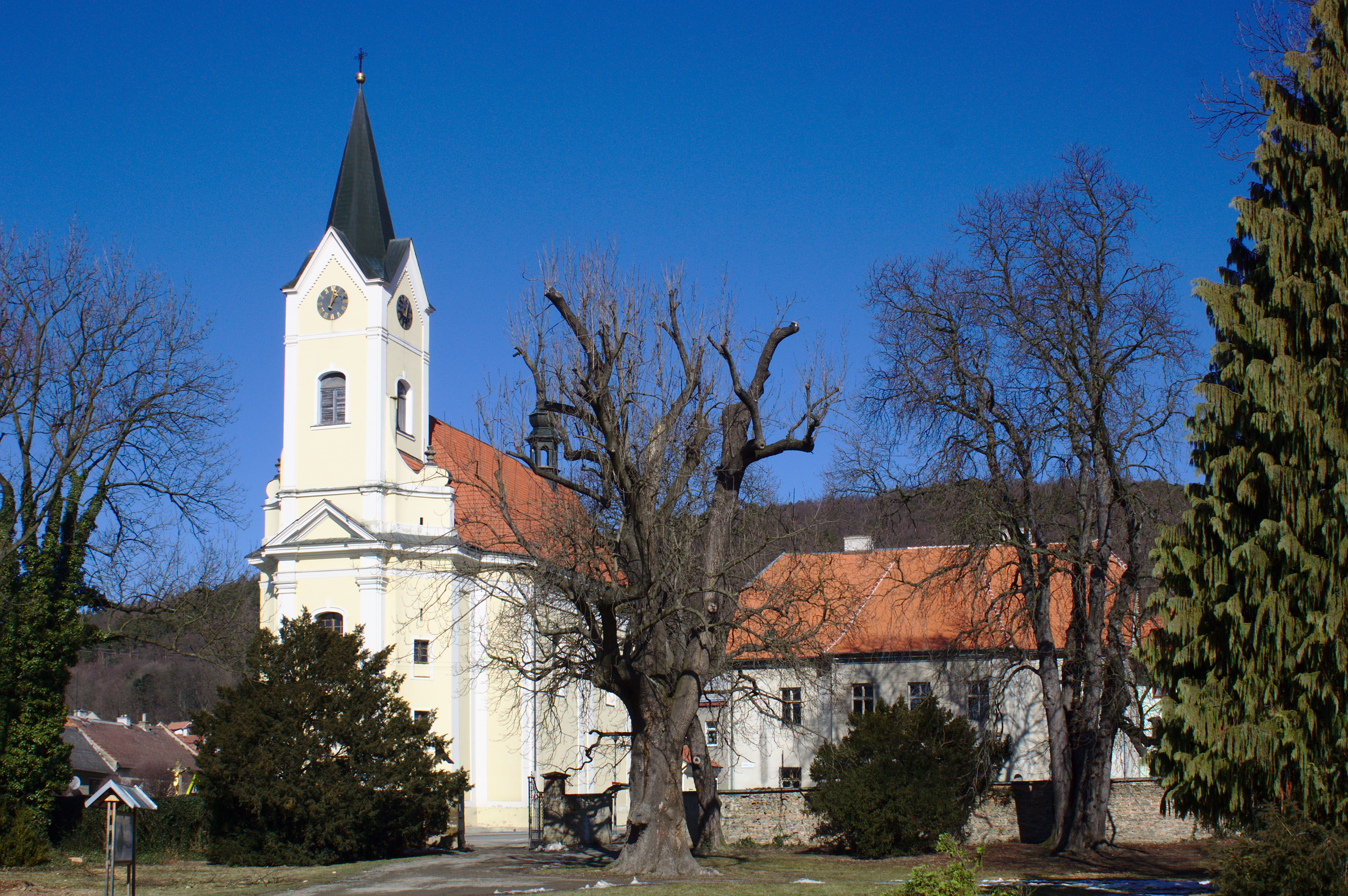 Čechy pod Kosířem - church and rectory.